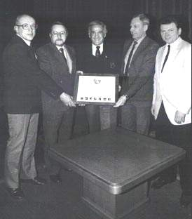 Vilnius, 1991 m. kovo 30 d. Istorinė IFBB prezidento viešnagė Lietuvoje. Iš kairės - susitikimo Lietuvos Respublikos Aukščiausioje Taryboje dalyviai: ilgametis Lietuvos kultūristų organizacijos vadovas Romanas Kalinauskas, Aukščiausiosios Tarybos pirmininkas Vytautas Landsbergis, IFBB prezidentas Benas Weideris, Lietuvos tautinio olimpinio komiteto viceprezidentas Kazimieras Motieka ir Lietuvos tautinio olimpinio komiteto prezidentas Artūras Poviliūnas.